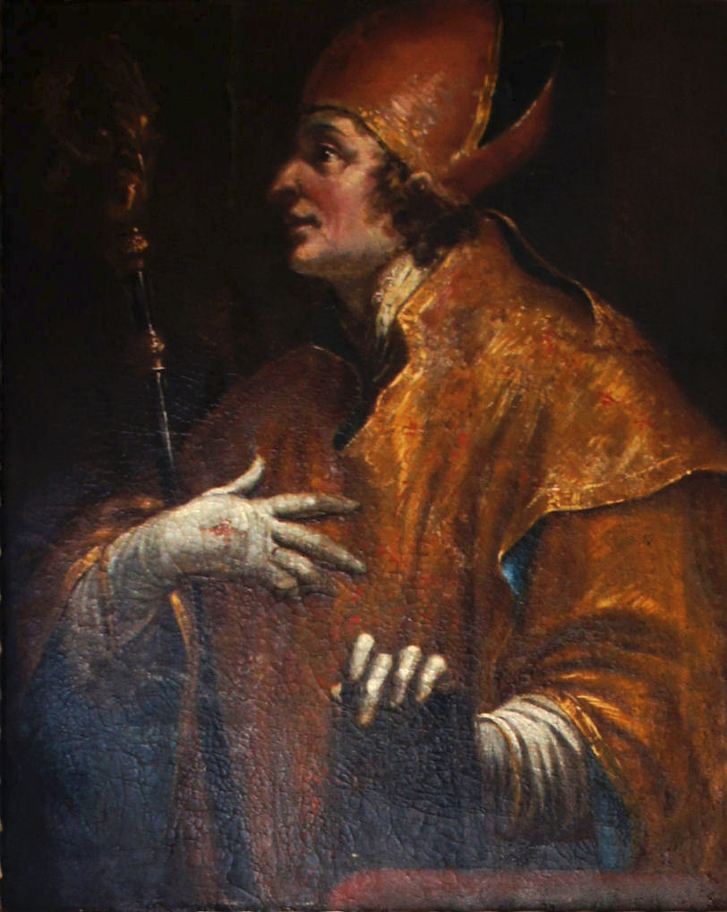 Porträtgemälde von Hermann von Cilli, Fürstbischof von Freising, im Fürstengang zwischen Fürstbischöflicher Residenz und Freisinger Dom.